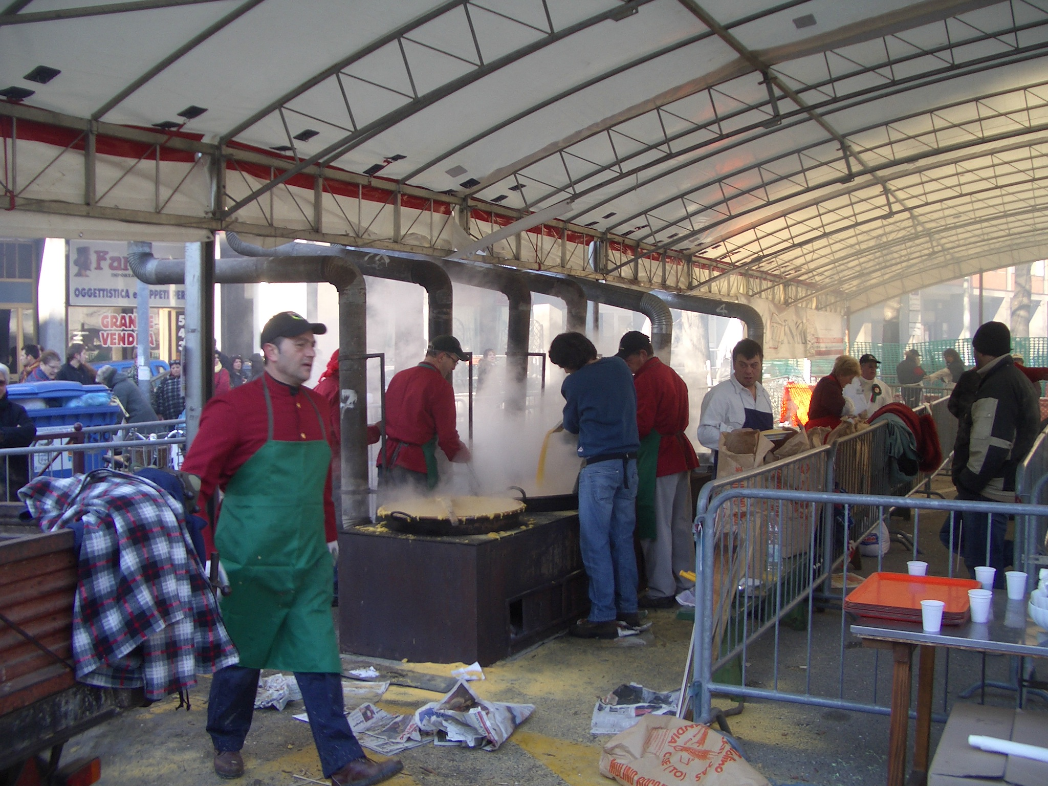 Carnival of Ivrea, Mercoledì delle Ceneri; distribuzione di polenta e merluzzo (Ash Wednesday; distribution of “polenta” and code-fish)